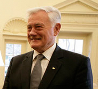 President of Lithuania, Valdas Adamkus